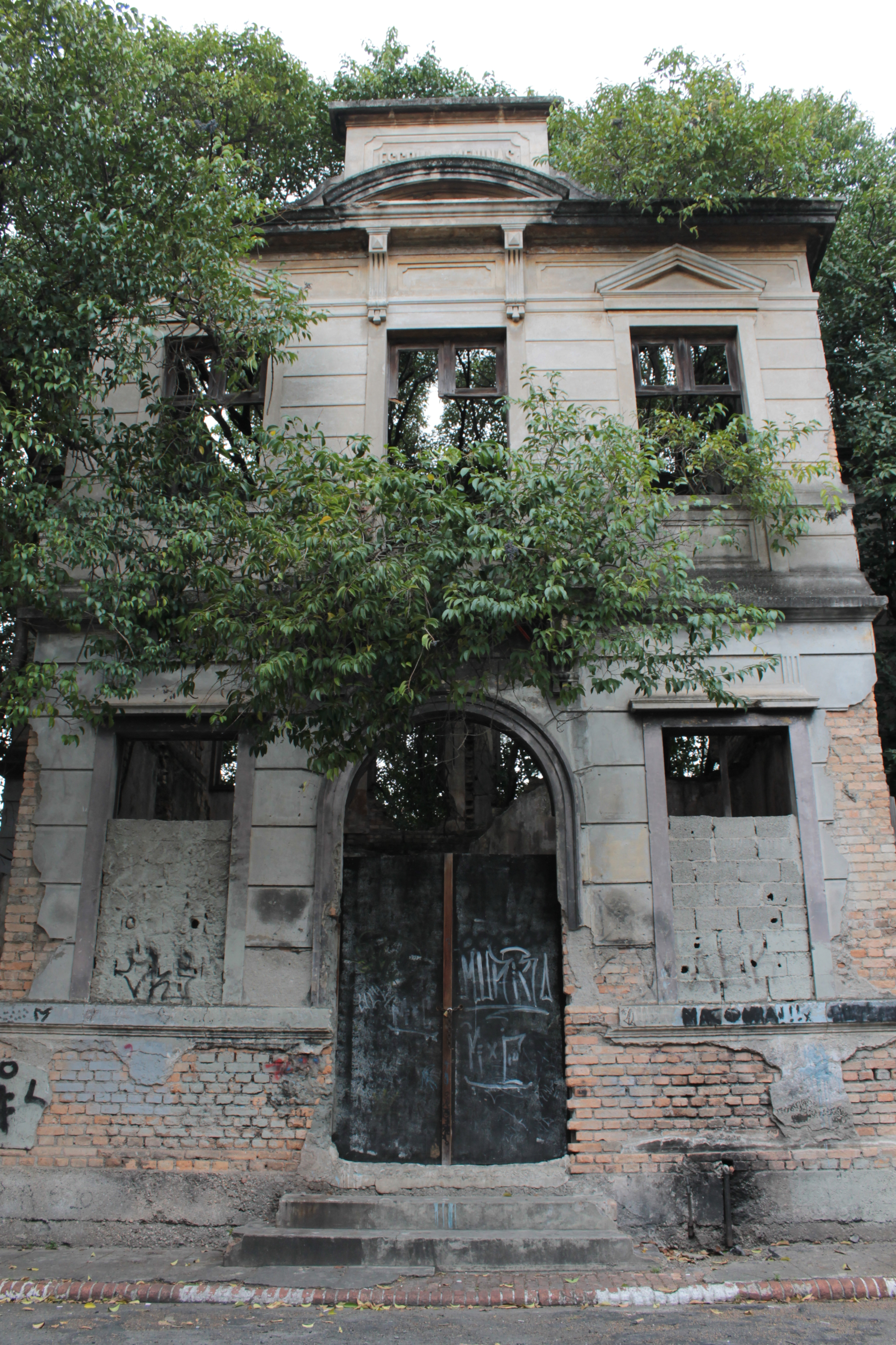 Vista frontal da Escola de Meninas